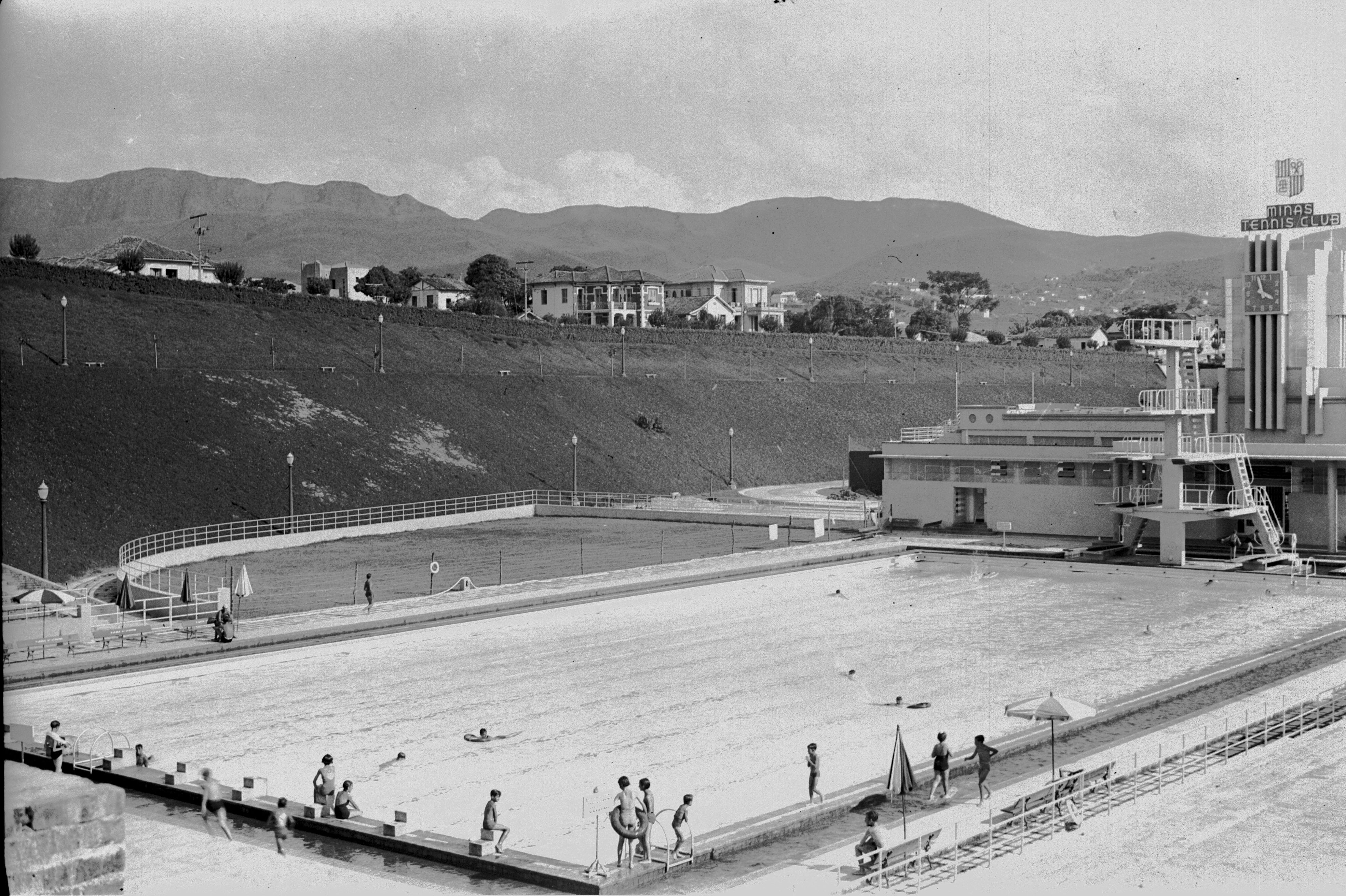 Foto do Minas Tênis Clube em Belo Horizonte (Ruas da Bahia, Antônio Aleixo, Espírito Santo e Antônio de Albuquerque) tirada pelo meu avô Aristides Henriques de Oliveira em 1938